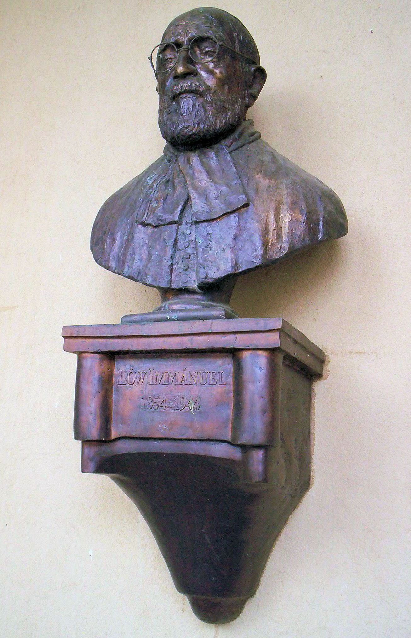 Lőw Immánuel szobra Szegeden (Dóm tér, történelmi szoborcsarnok), Lapis András alkotása